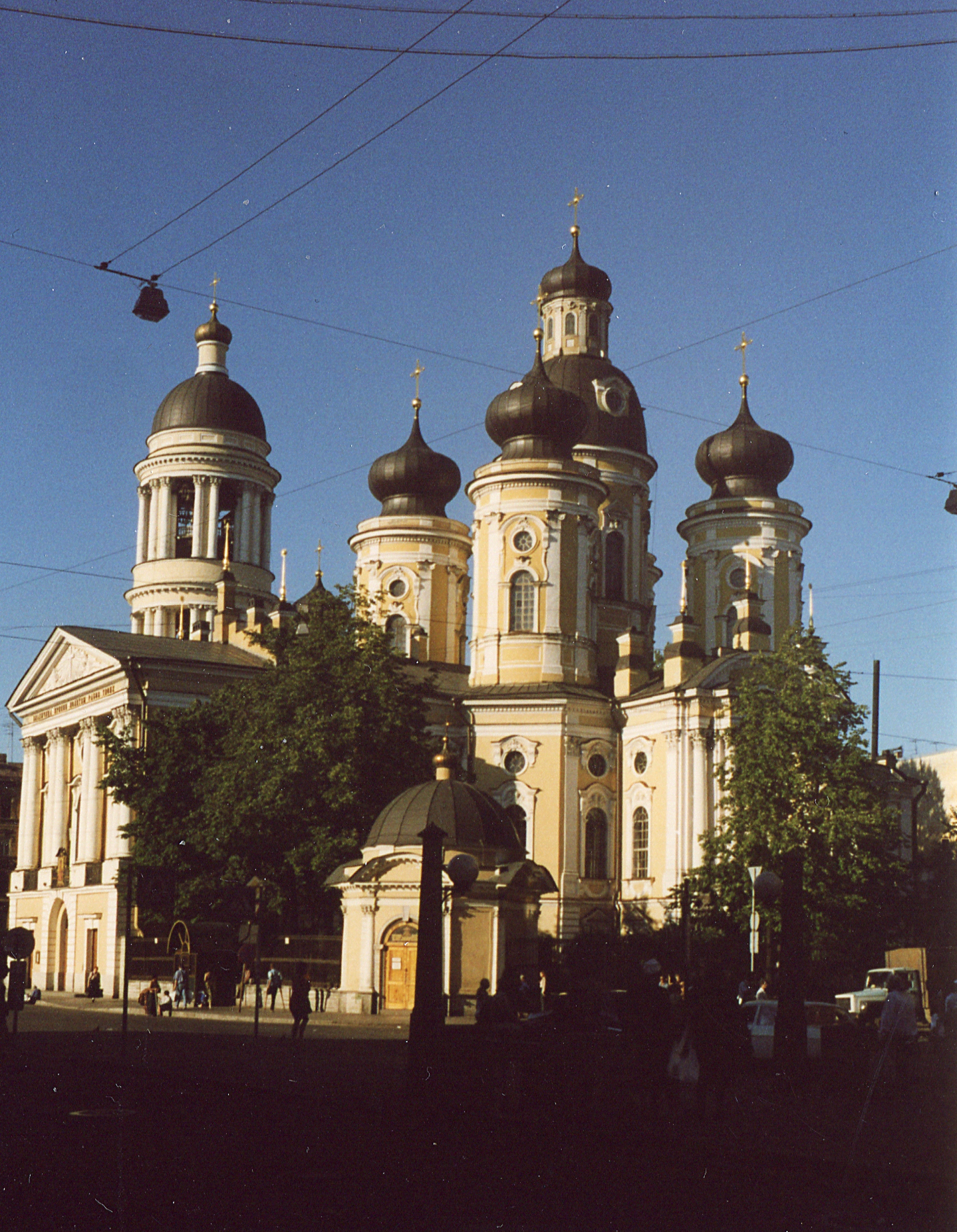 Владимирская церковь